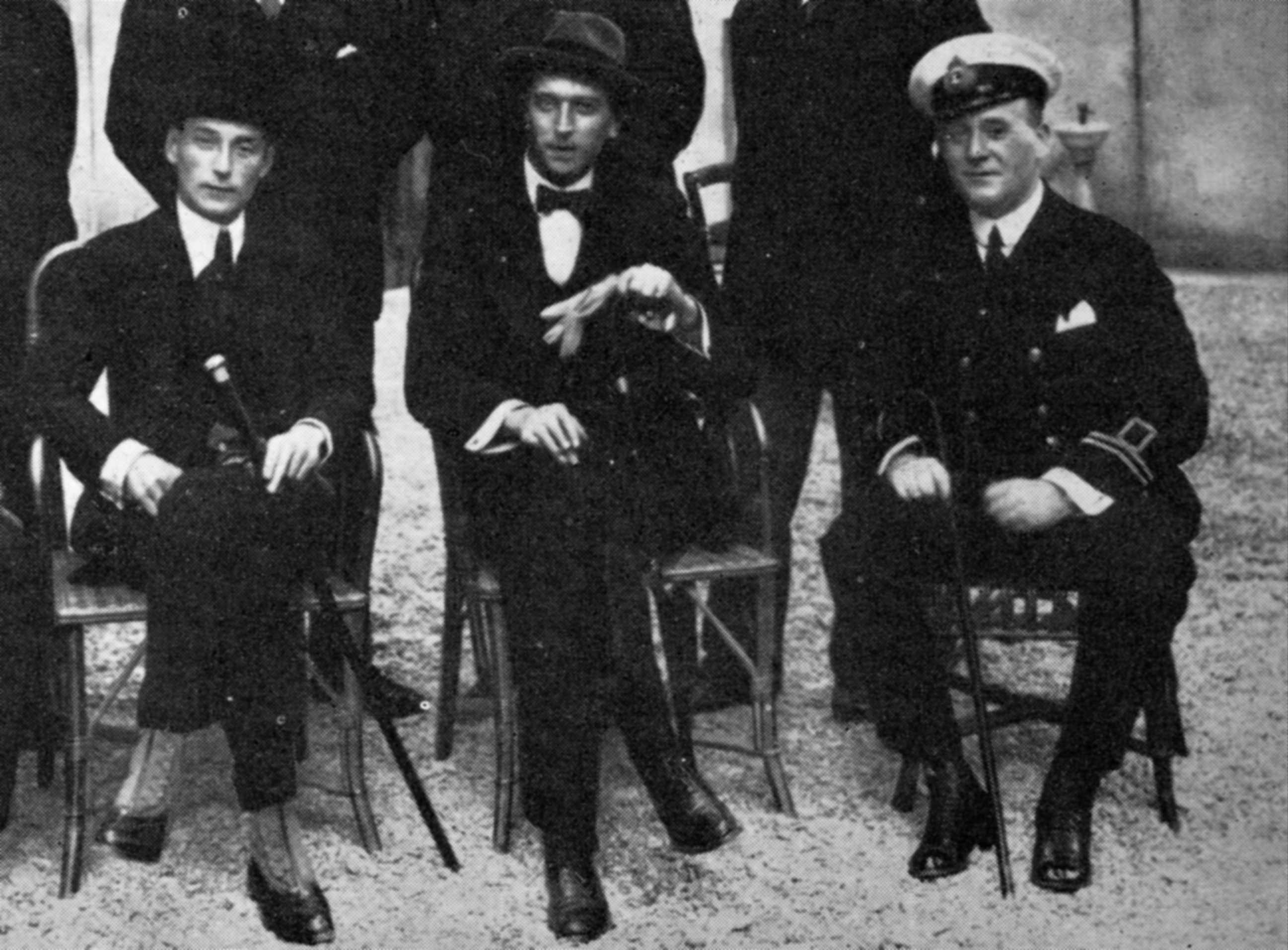 C. Mackenzie, W. Sells, Lt. Tucker